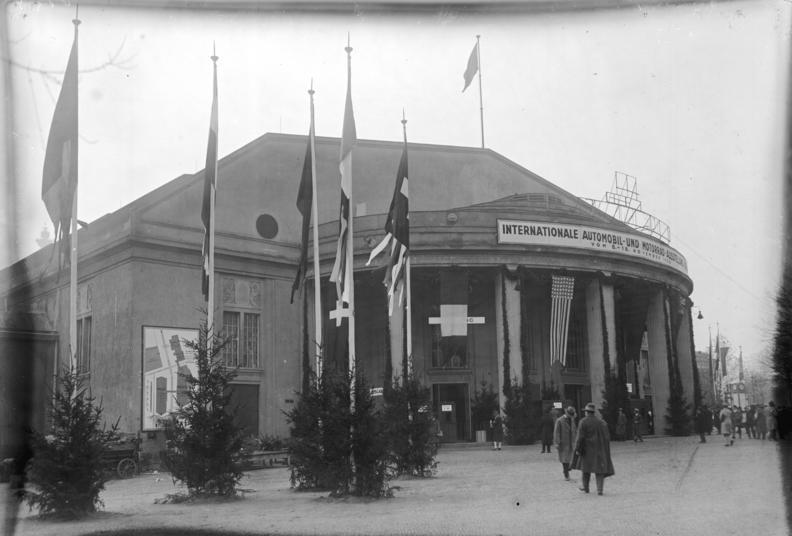 Die Eröffnung der Internationalen Automobilausstellung in den Ausstellungshallen am Kaiserdamm in Berlin! Blick auf die alte Autohalle mit den Fahnen der Nationen nach der Eröffnung.